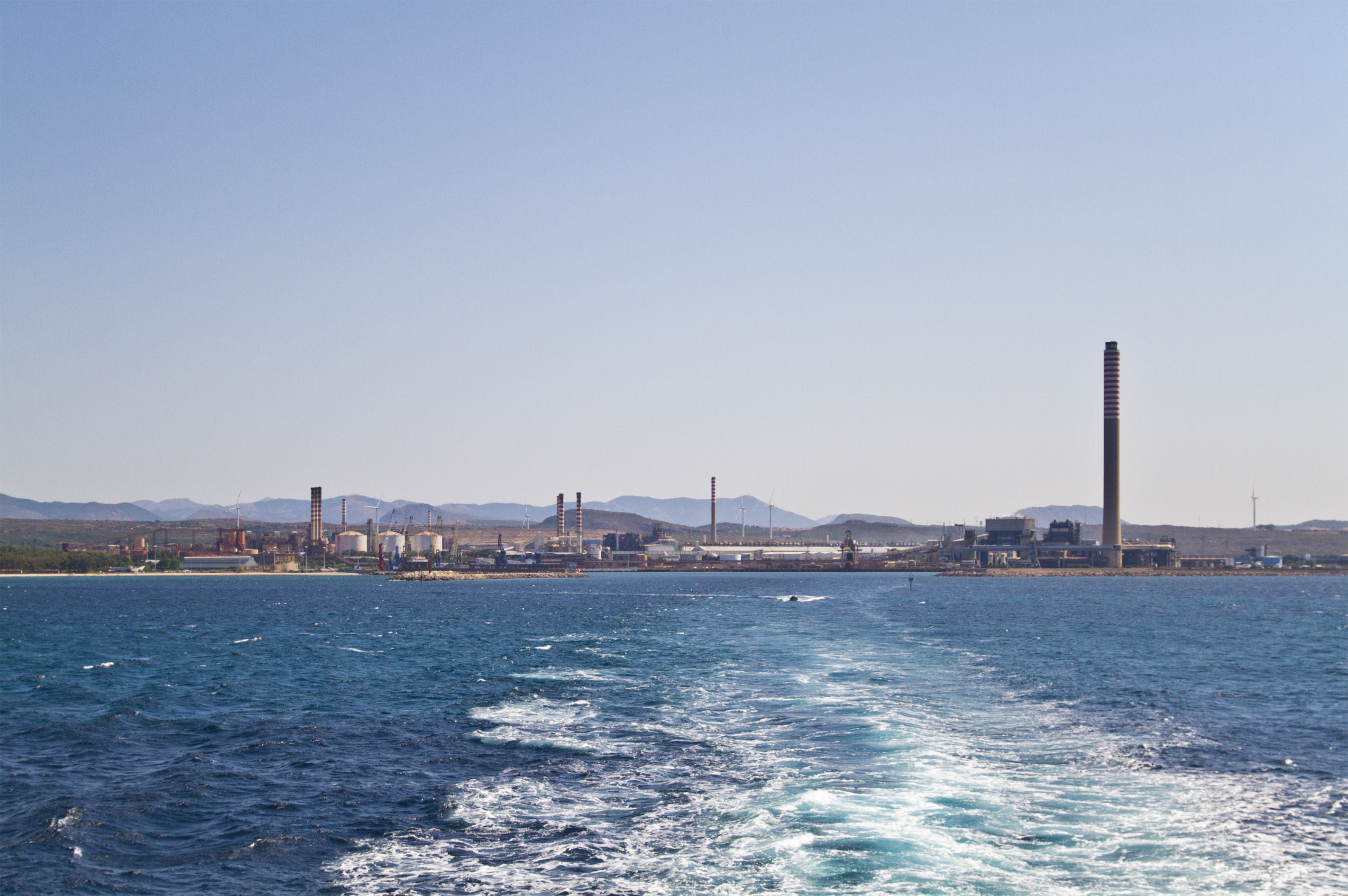 Polo Industriale di Portovesme CI, Sardinia, Italy